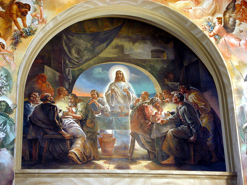 Santa Ceia